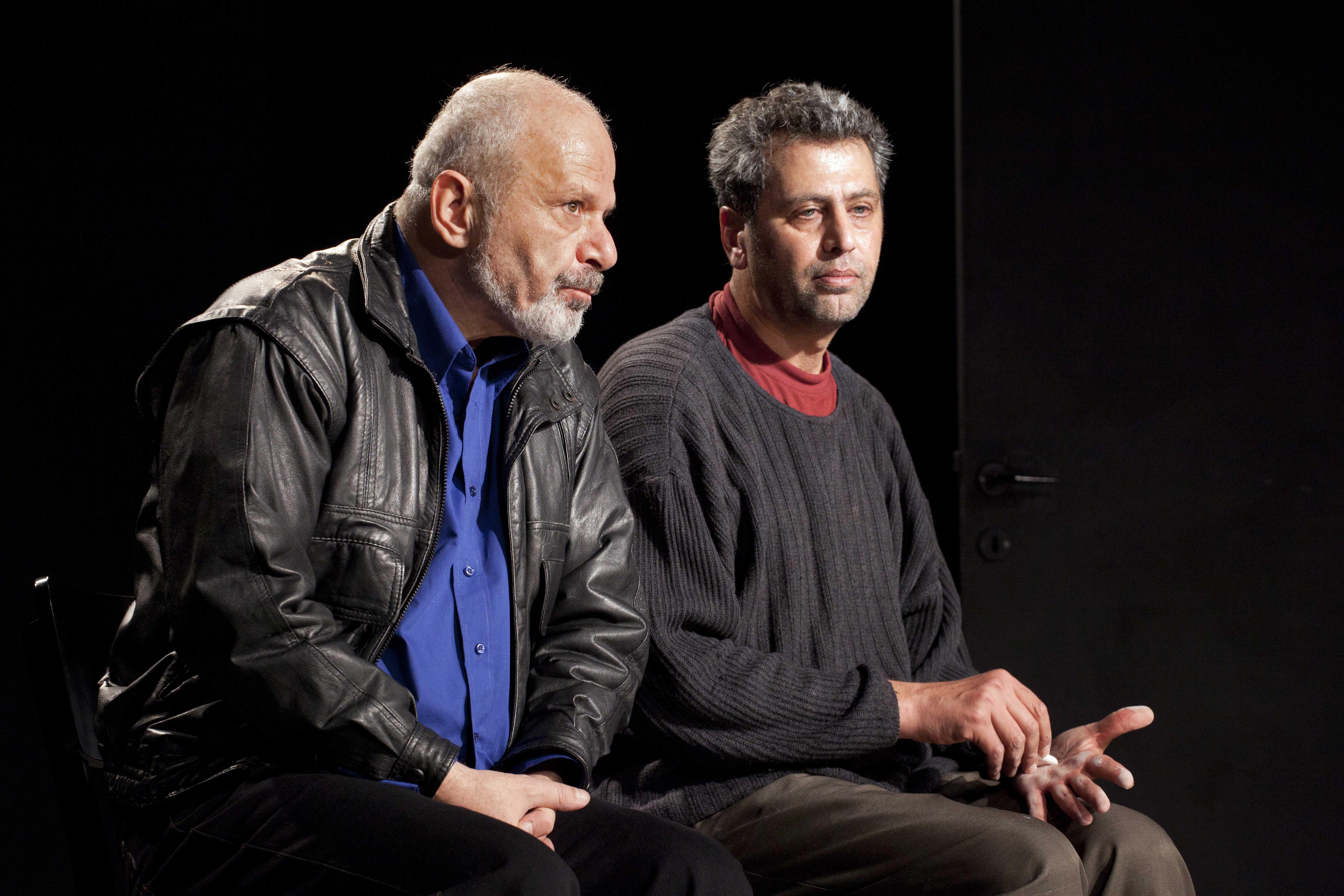 ח'ליפה נאטור ויוסוף אבו ורדה בהצגה "יוליסס על בקבוקים", מאת גלעד עברון, בבימויה של אופירה הניג, תיאטרון חיפה